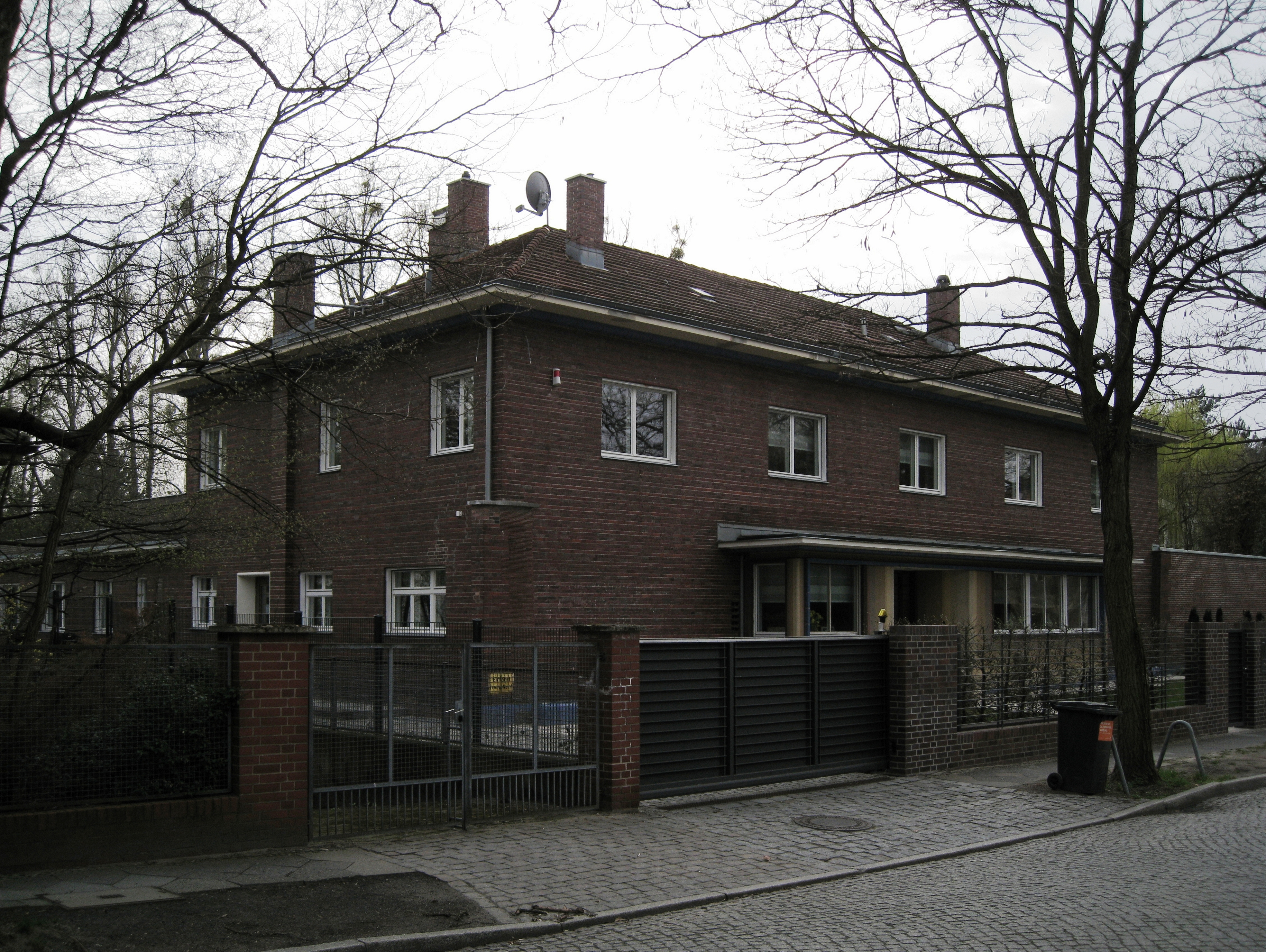 Wohnhaus